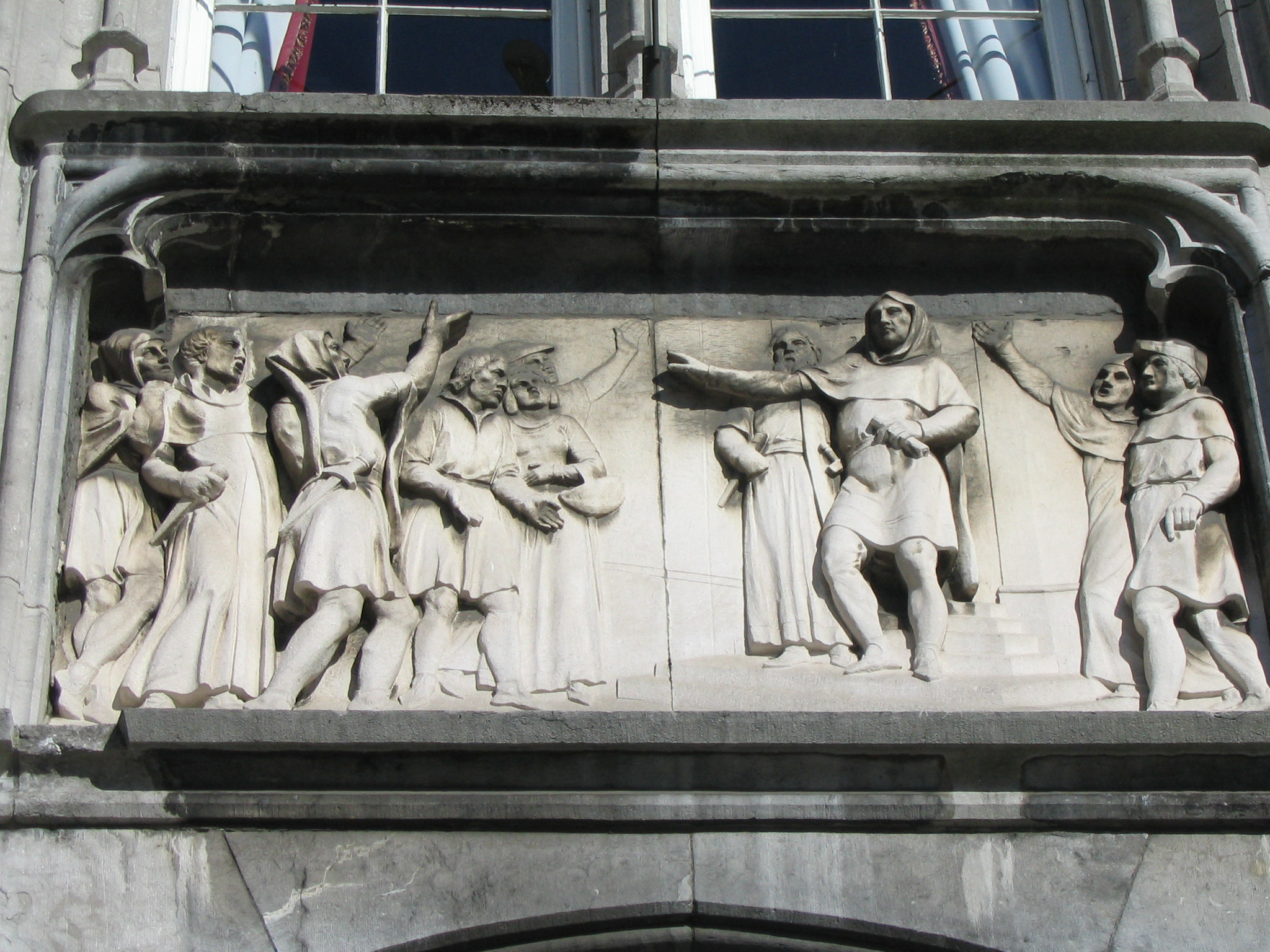 Bas-relief représentant l'élection des deux premiers bourgmestres de Liège sur la façade néogothique ouest du Palais provincial de Liège (Palais des Princes-Évêques de Liège)